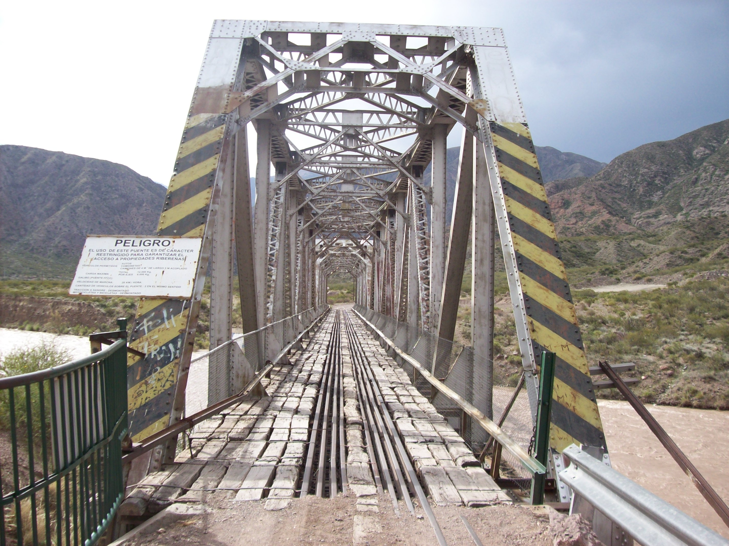 Puente del ex-Ferrocarril Trasandino sobre el Río Mendoza, en la Provincia de Mendoza, Argentina. Actualmente sirve como puente vehicular para el acceso de los terrenos circundantes. Este puente se encuentra en el km 1101 de la Ruta Nacional 7.